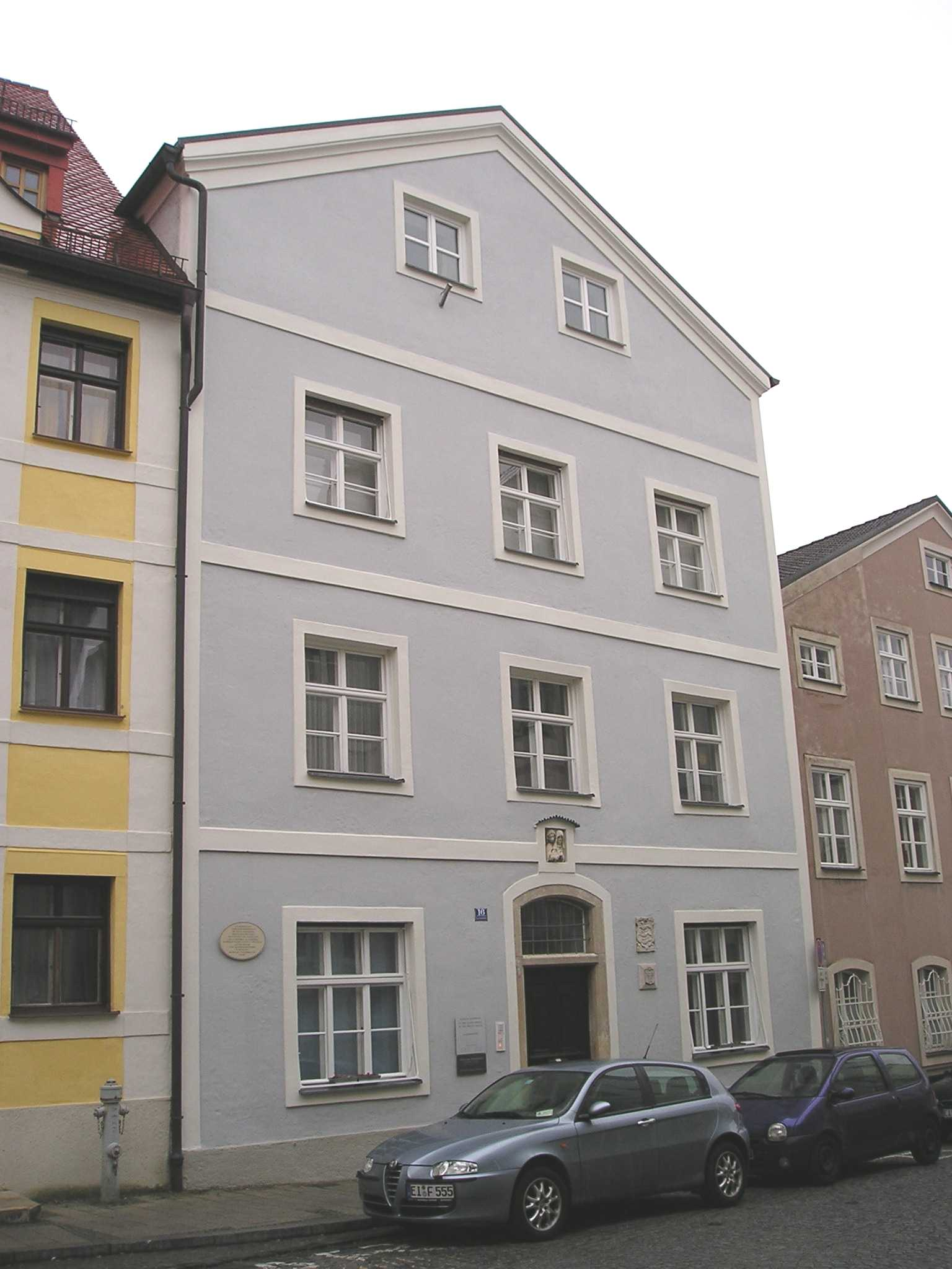 Geburtshaus von Max von Widnmann in Eichstätt, Luitpoldstraße